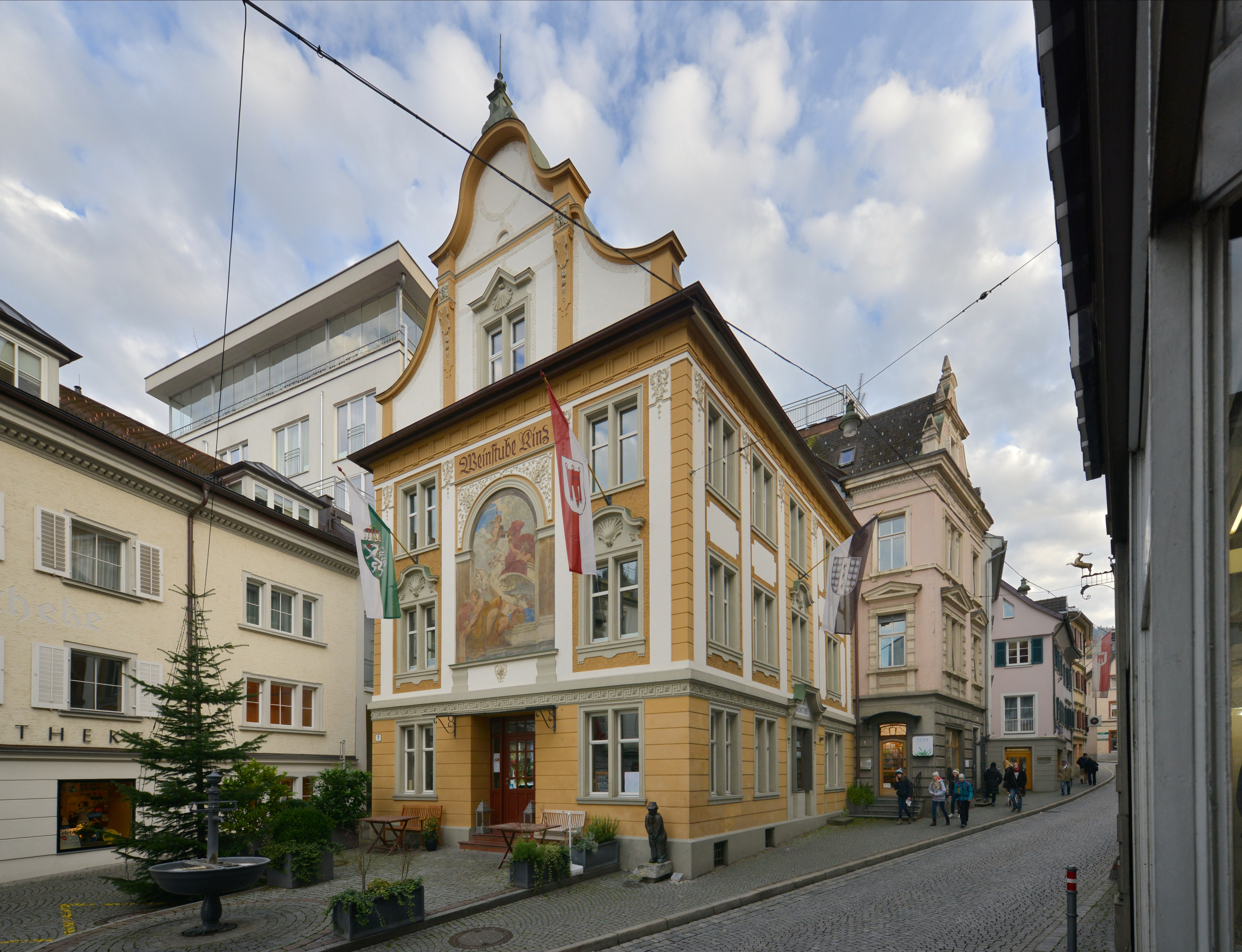 Bregenz, Weinstube Kinz